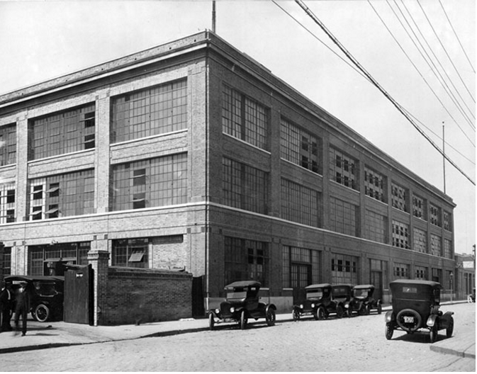 A fábrica da Ford no Bom Retiro nos anos 1920